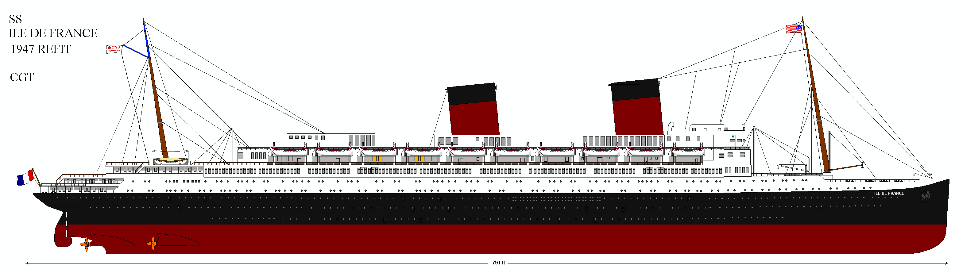 лайнер Иль де Франс до реставрации и модернизации 1947 года